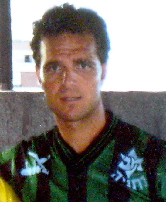 אבי כהן, צולמה במסגרת משחק הכדורגל של מכבי נתניה אותה אימן אבי כהן. התמונה צולמה במגרש הכדורגל בנתניה.